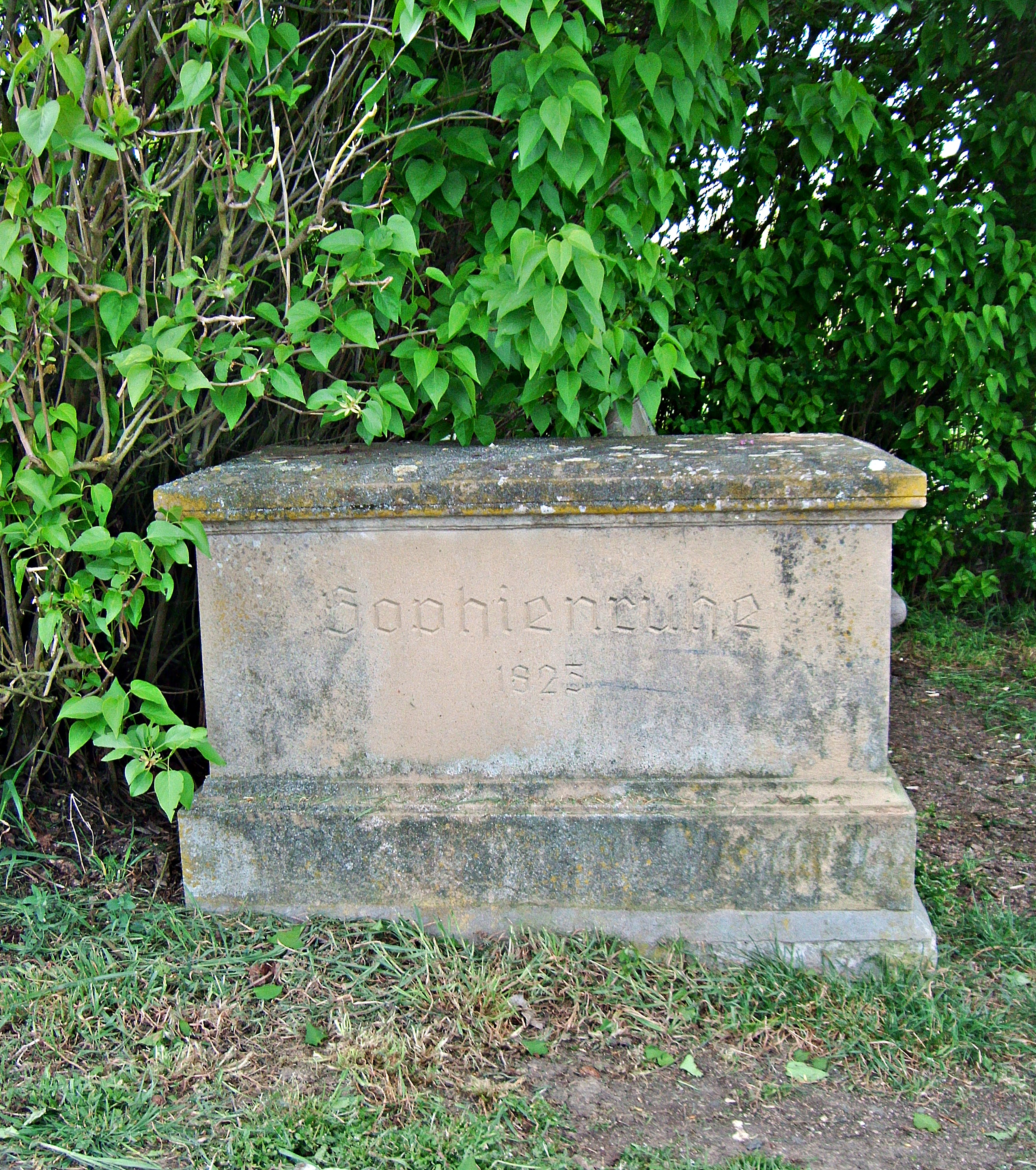 "Sophienruhe 1825", Gedenkstein westlich von Grünstadt, errichtet von Lateinschulrektor Heinrich Dittmar (1792-1866) im Gedenken an seine 1826 verstorbene Frau Sophie